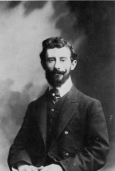 Photographie du compositeur français Maurice Ravel